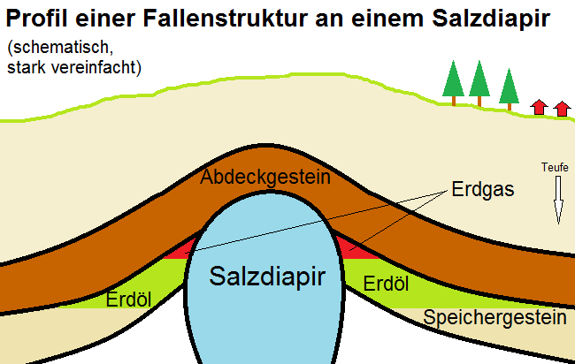 Fallenstruktur an einem Salzdiapir, stark vereinfachtes, schematisches Profil, das die Akkumulation von Kohlenwasserstoffen zeigt.